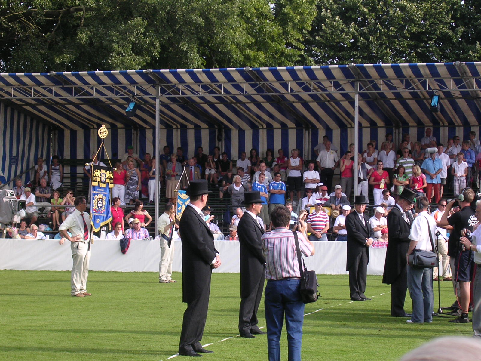 Iepening fan de PC yn 2008